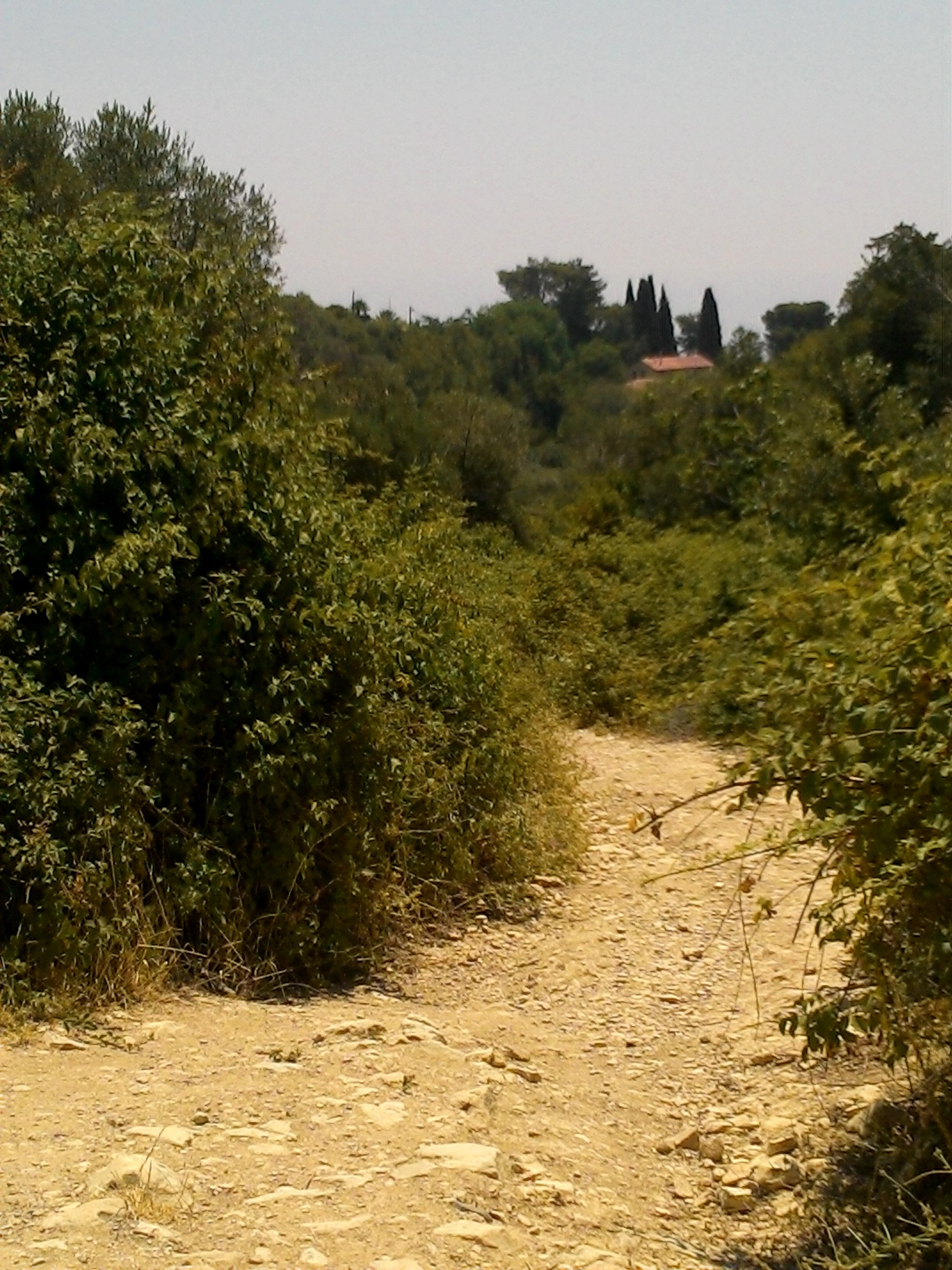 מבט מהנחל על המושבה ראש פינה